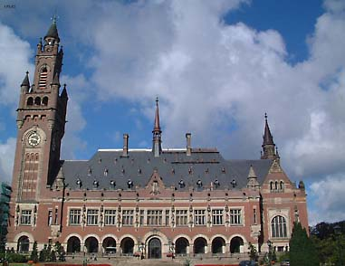 Genomen augustus 2003 in Den Haag